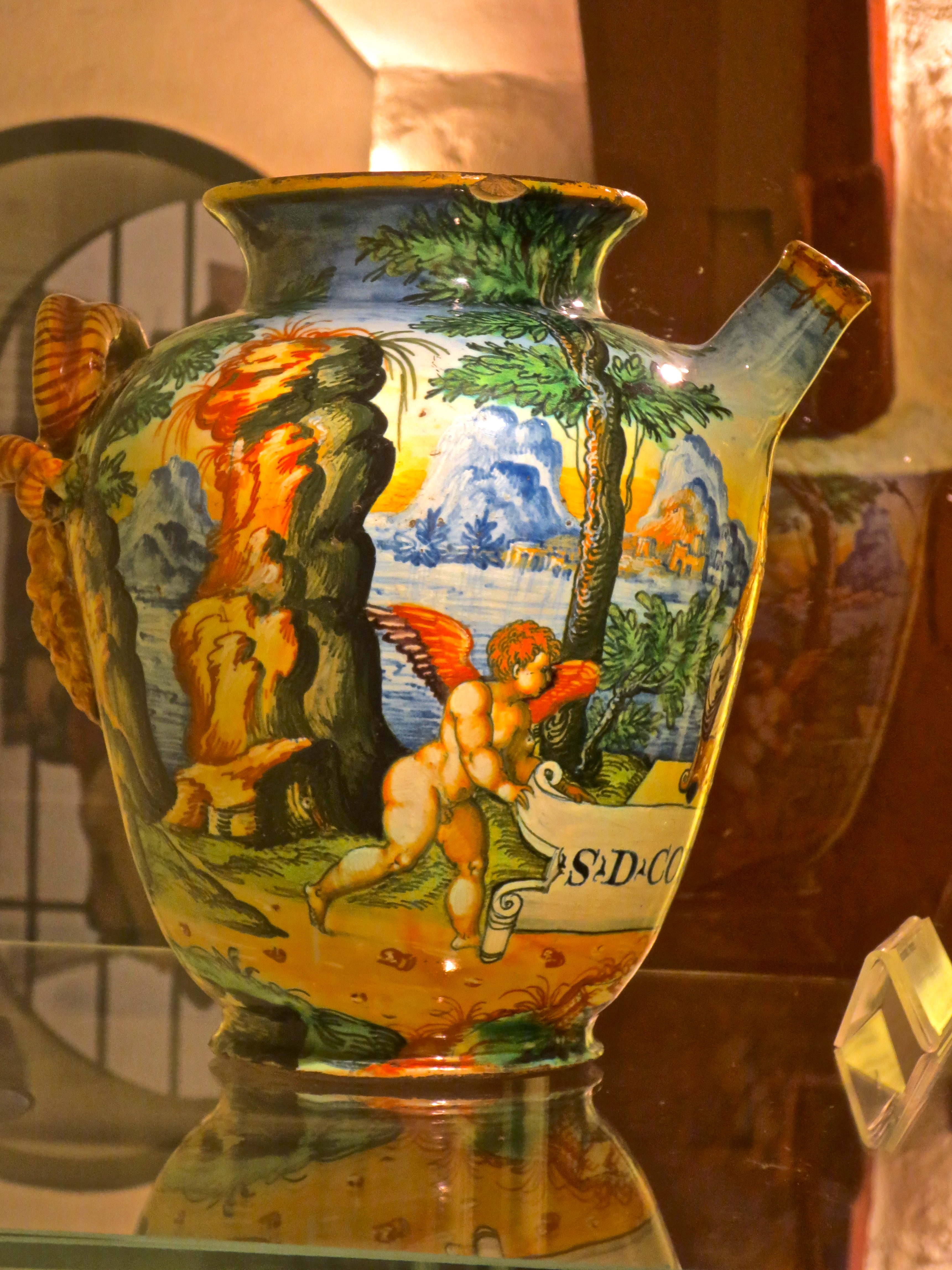 II. Deutsches Apothekenmuseum Heidelberg Majolika Renaissance Gefäß für pharmazeutische Stoffe